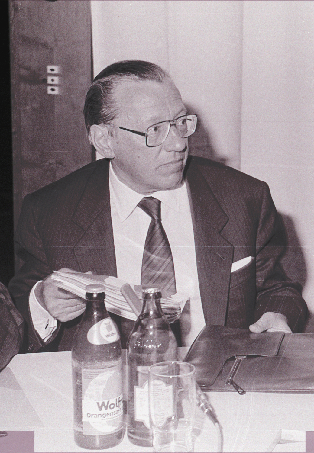 Prof. Dr. Hans Gerhard Schwick, deutscher Mediziner und Biologe, ehemaliger Vorstand der Behringwerke und Professor an der Philipps-Universität Marburg. Hier während des SZ-Gesundheitsforums am 12. Mai 1986 in München.